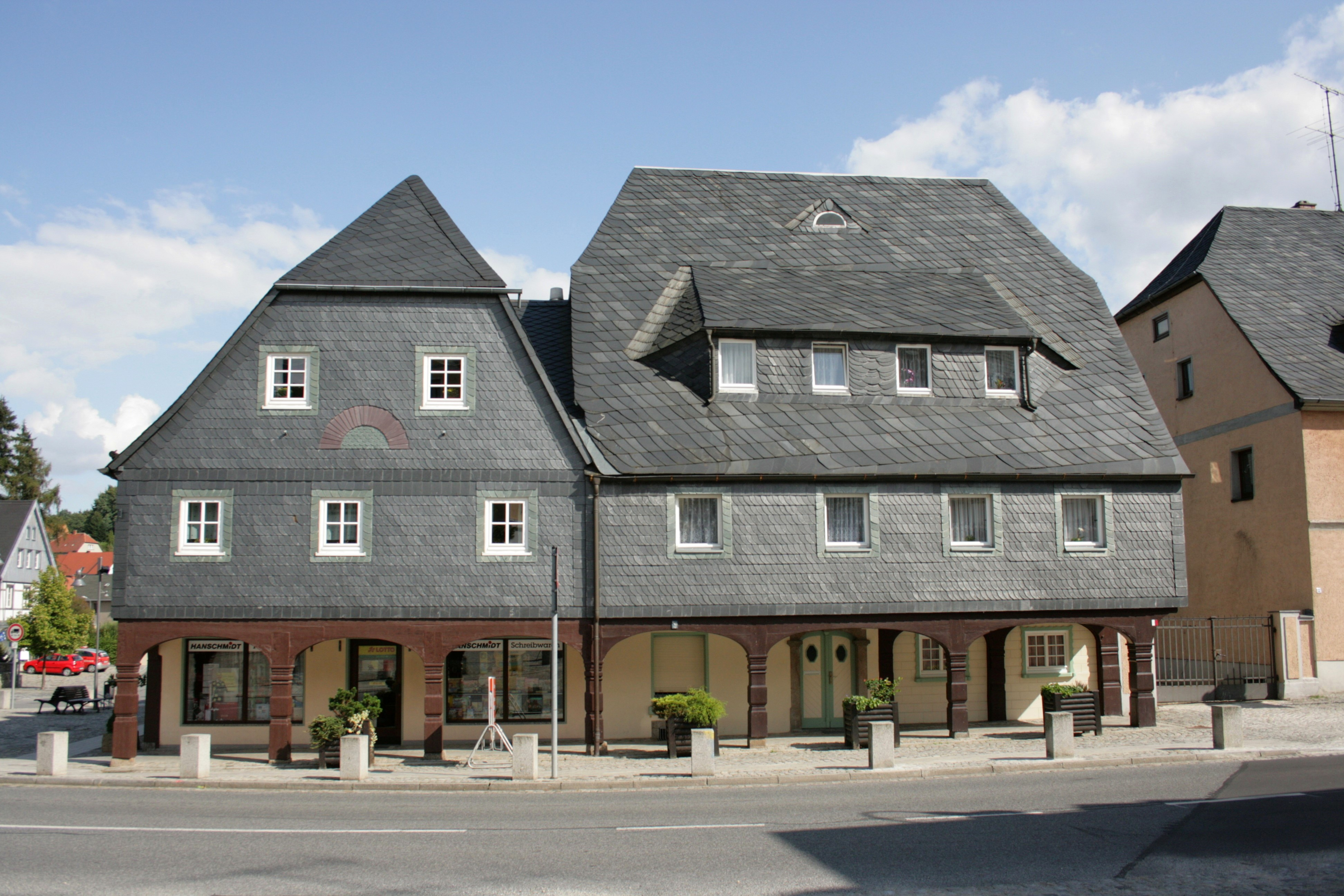 Anfang der Hauptstraße in Schirgiswalde, Laubenhäuser Markt 1 und Niedermarkt 2a